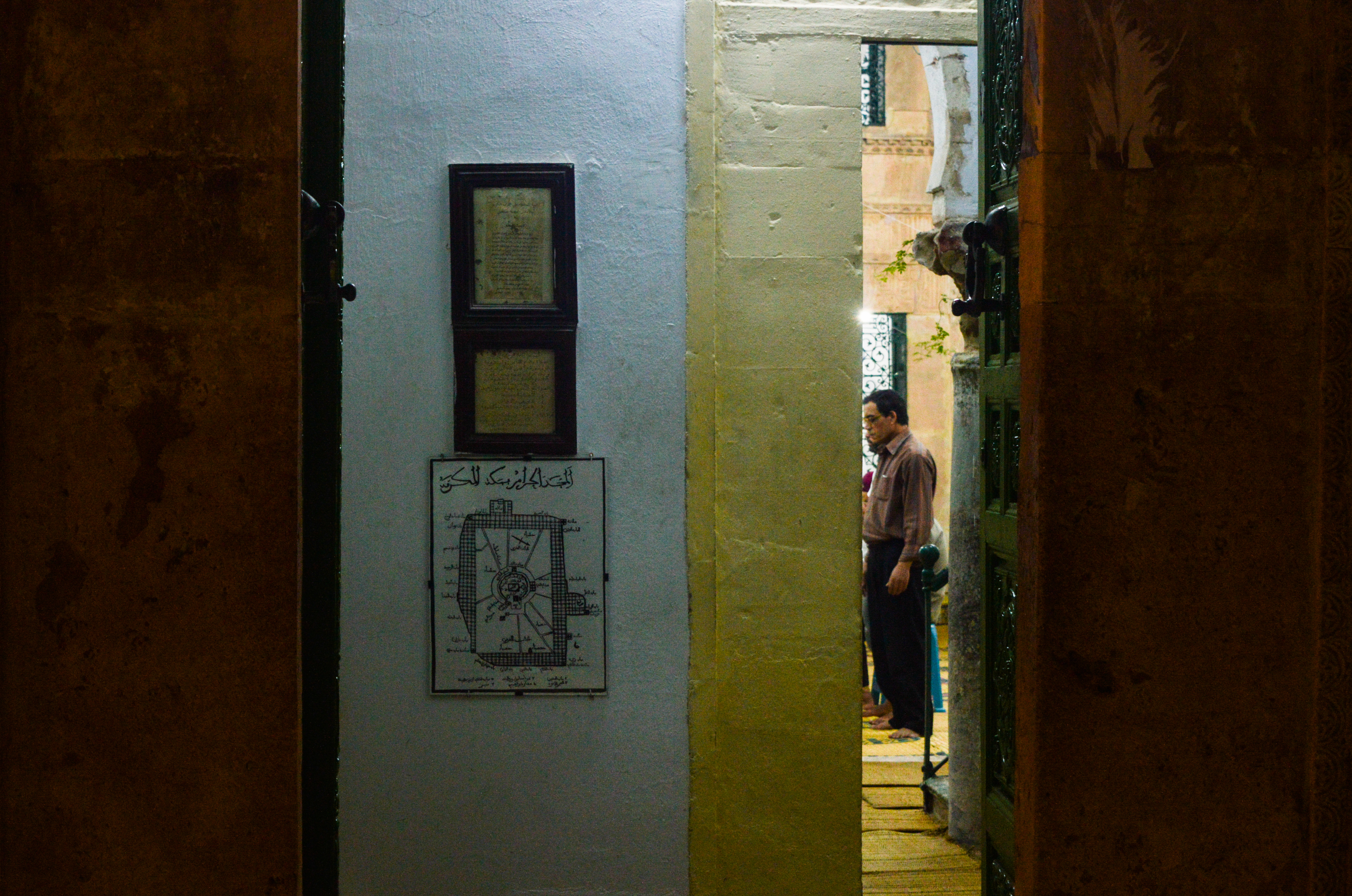 Mausolée Sidi Belhassen Karray à Sfax (Tunisie)